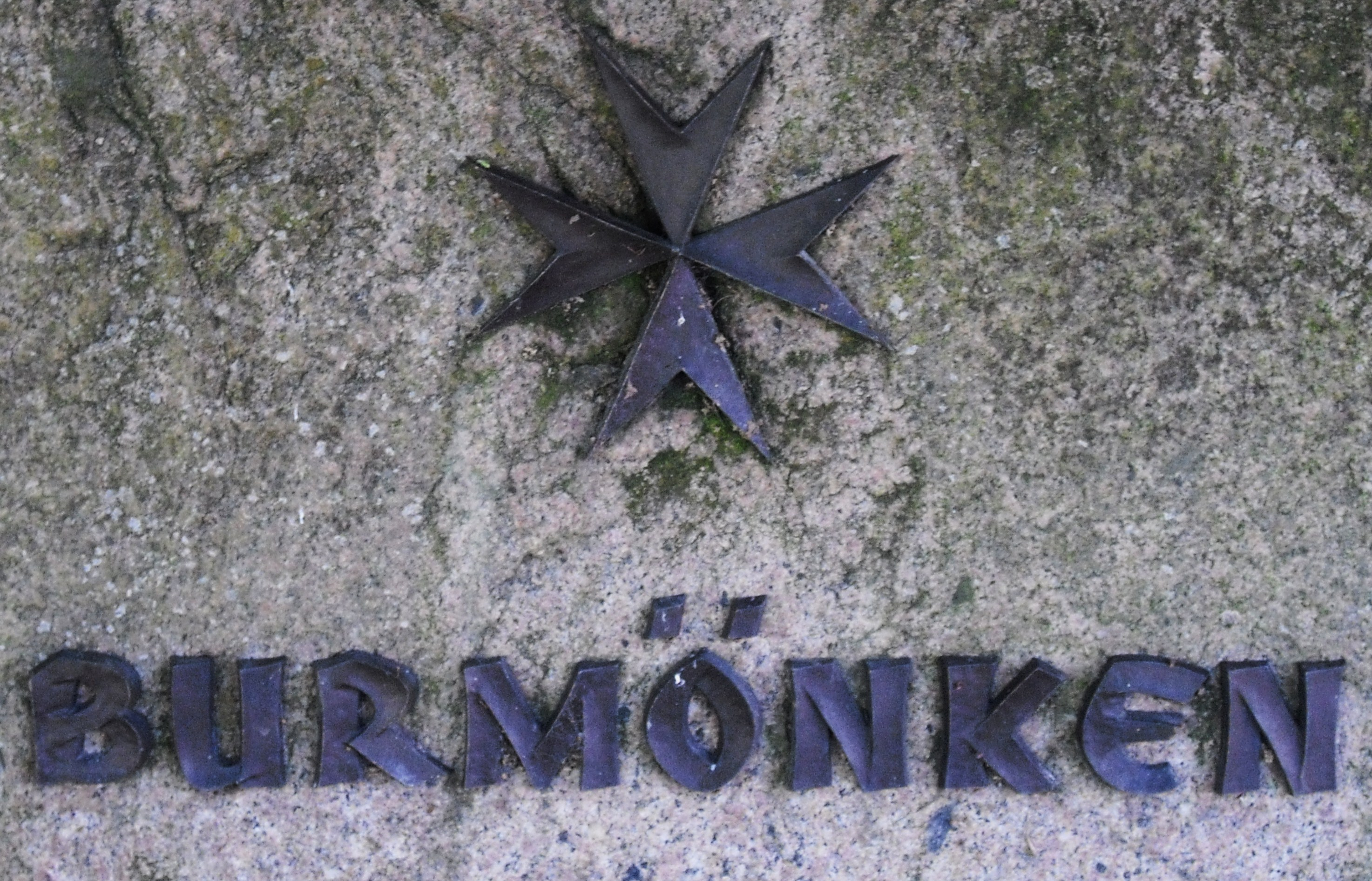 Ausschnitt aus einem Gedenkstein, der in der Ortschaft Burmönken zur Erinnerung an das ehemalige Johanniterkloster errichtet worden ist